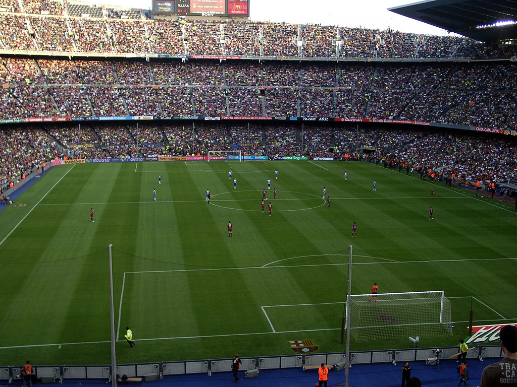 Derbi catalán en el Camp Nou. En la portería del FC Barcelona, con el dorsal 25, Jorquera.